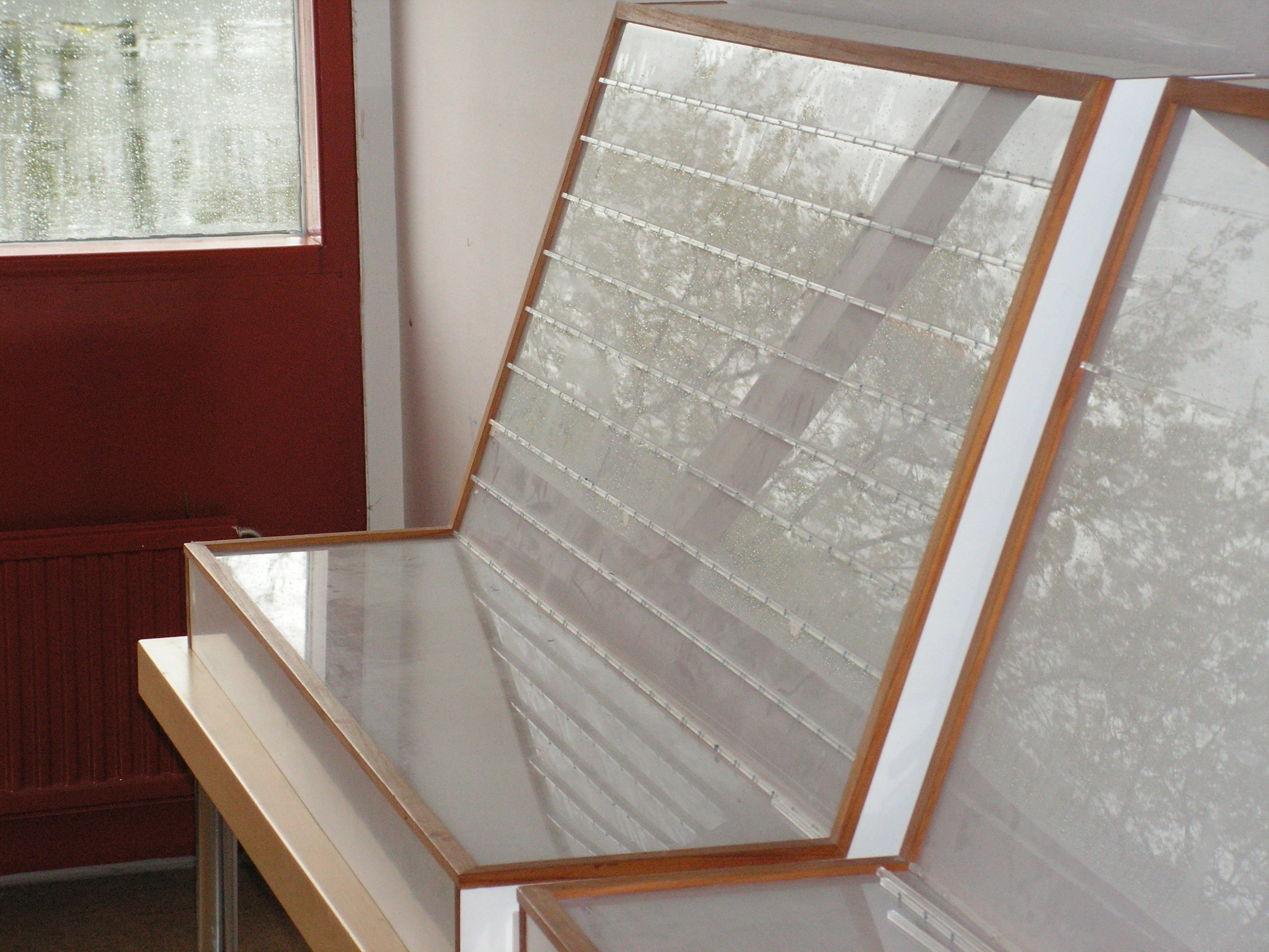 Stefan linder